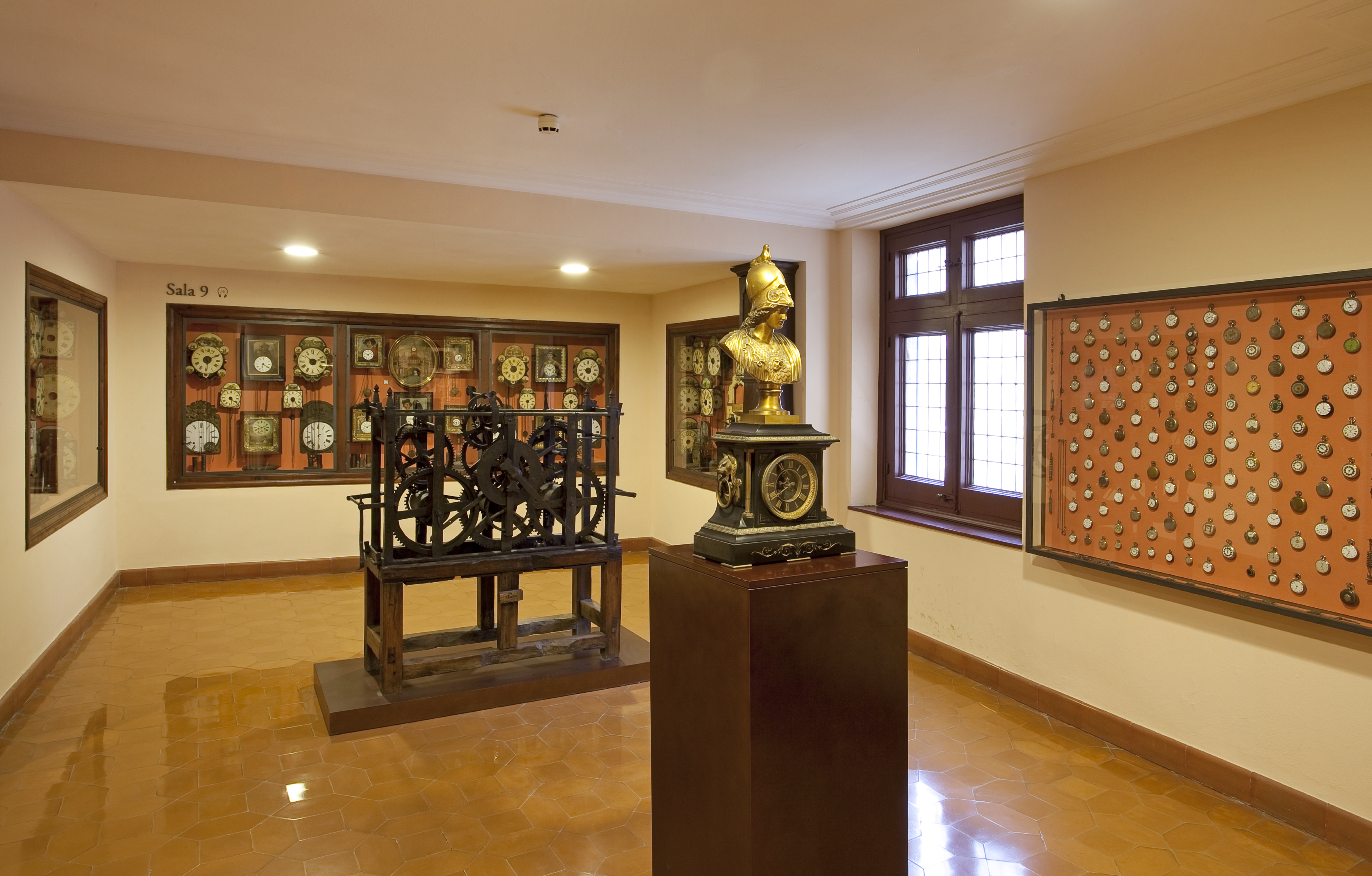 Rellotges Gabinet col·leccionista - Fot. GUILLEM F-H.jpg